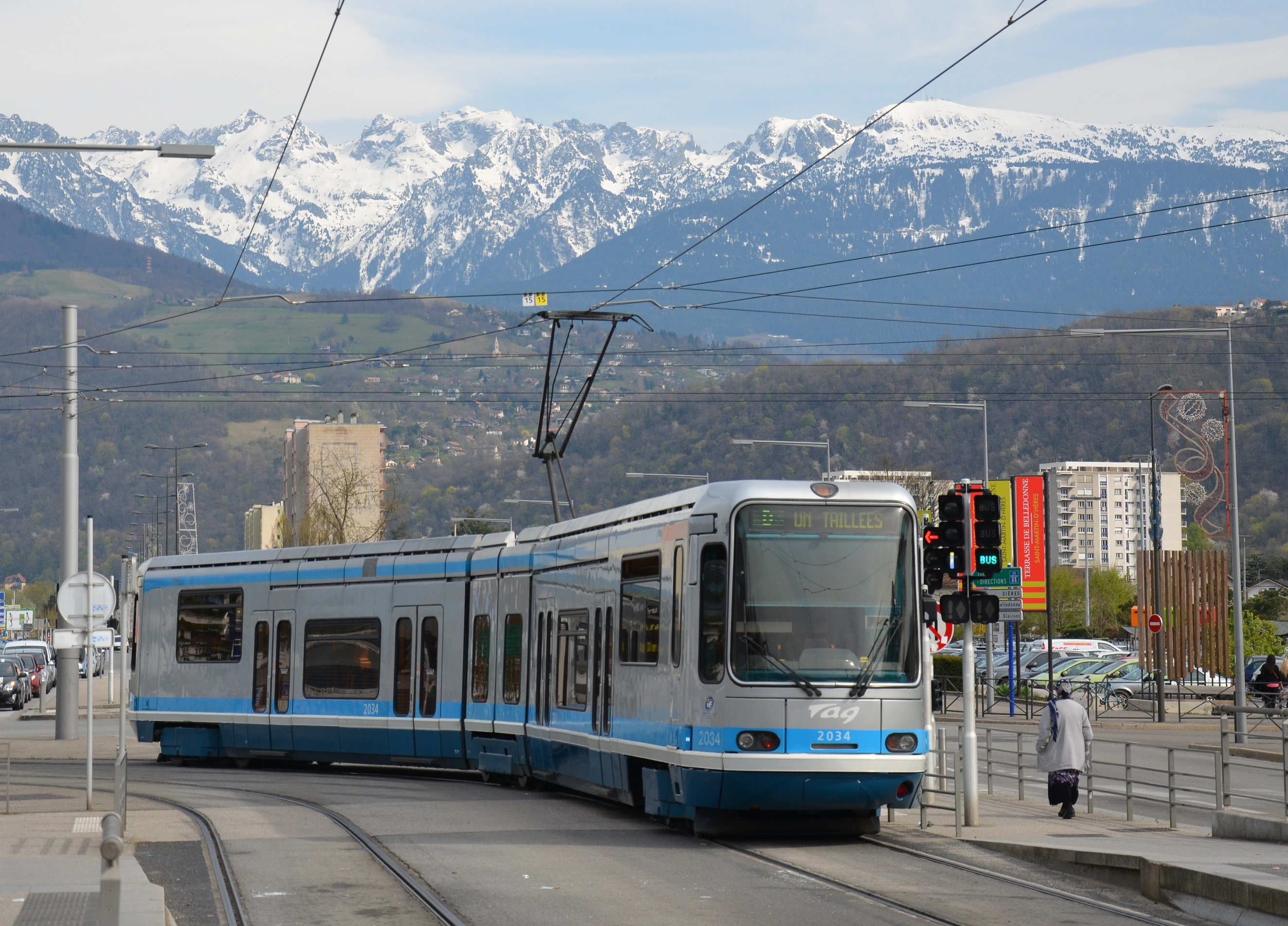 Alsthom TFS n°2034 du réseau TAG de Grenoble quittant la station de Neyrpic Belledonne, sur la ligne D du tramway.